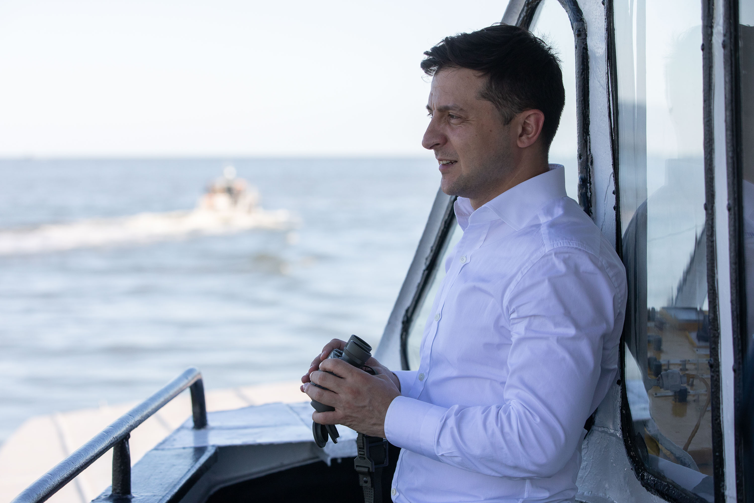 Під час робочої поїздки до Маріуполя Президент України Володимир Зеленський ознайомився, як відбувається підводне розмінування в акваторії Азовського моря.